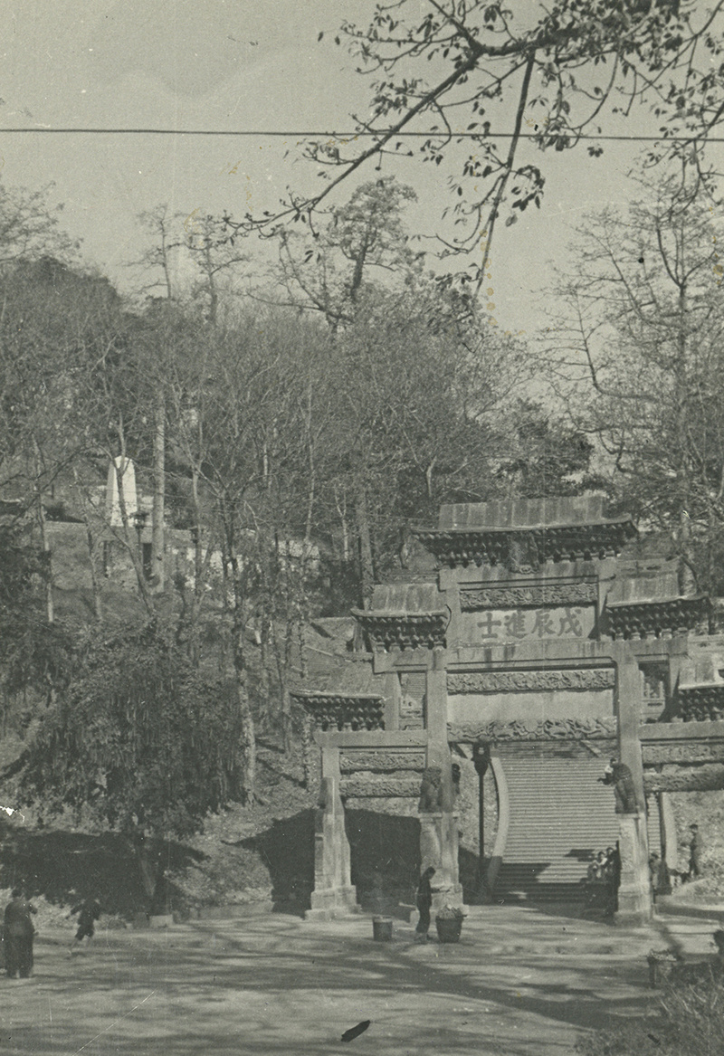 廣州市觀音山（越秀山）百步梯東入口的「戊辰進士」坊。